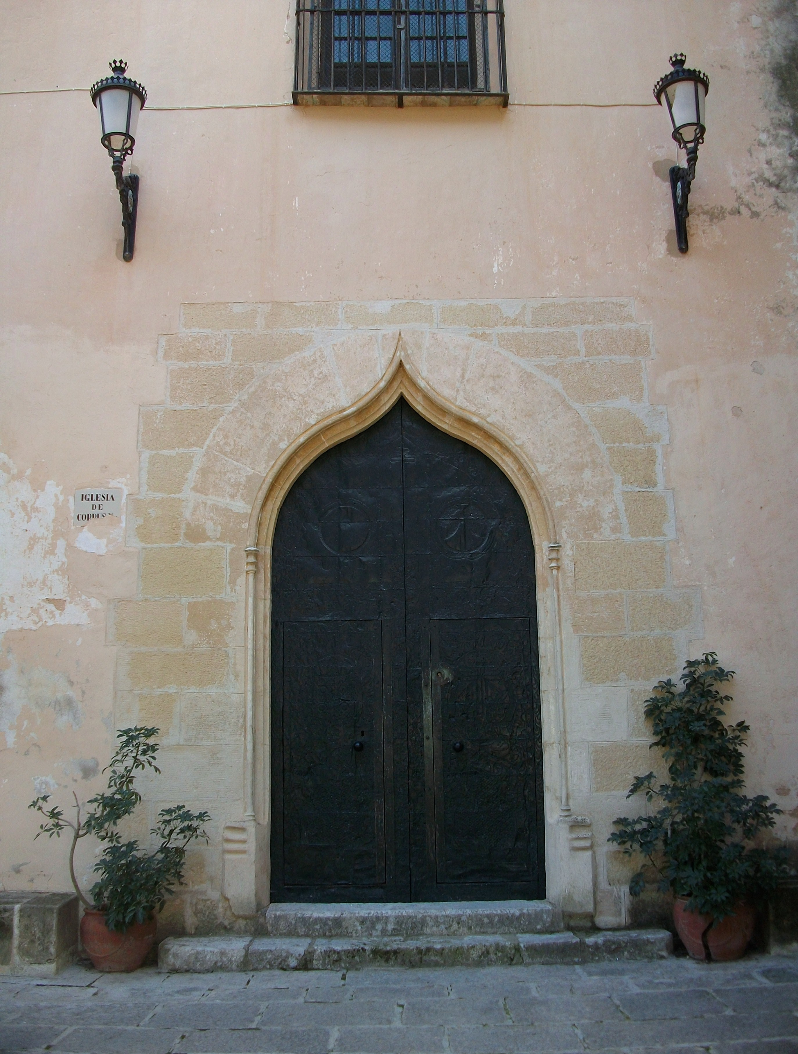 Portada de la basílica del Corpus Christi de Llutxent, Vall d'Albaida.